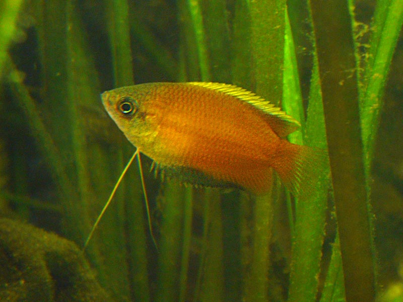 Honinggoerami (Trichogaster chuna, voorheen Colisa chuna)